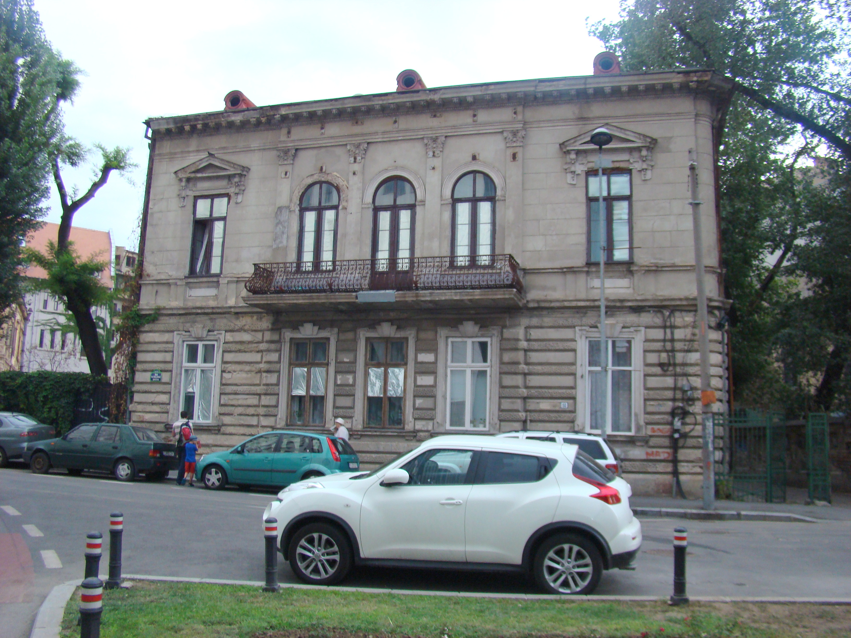 Casă monument istoric, str.Berthelot, nr.10